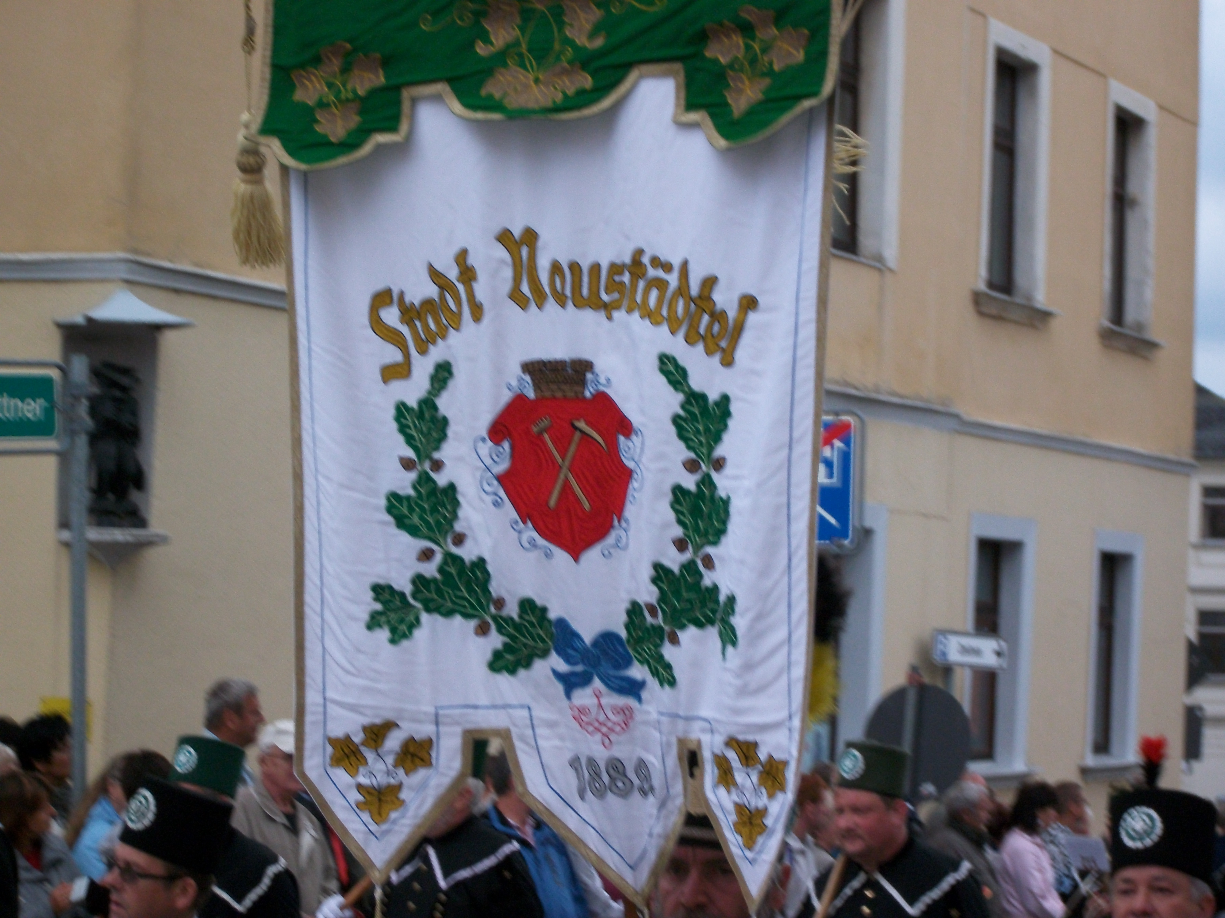 Wappen von Neustaedtel